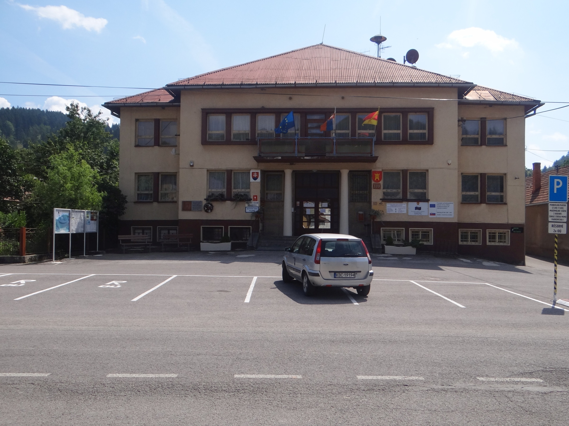 Sklabiňa